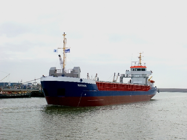 MS Hathor bij proefvaart, Damen Combi Freighter 3850 IMO Number: 9373280 MMSI Number: 244176000 Callsign: PHIY Length: 88 m Beam: 12 m